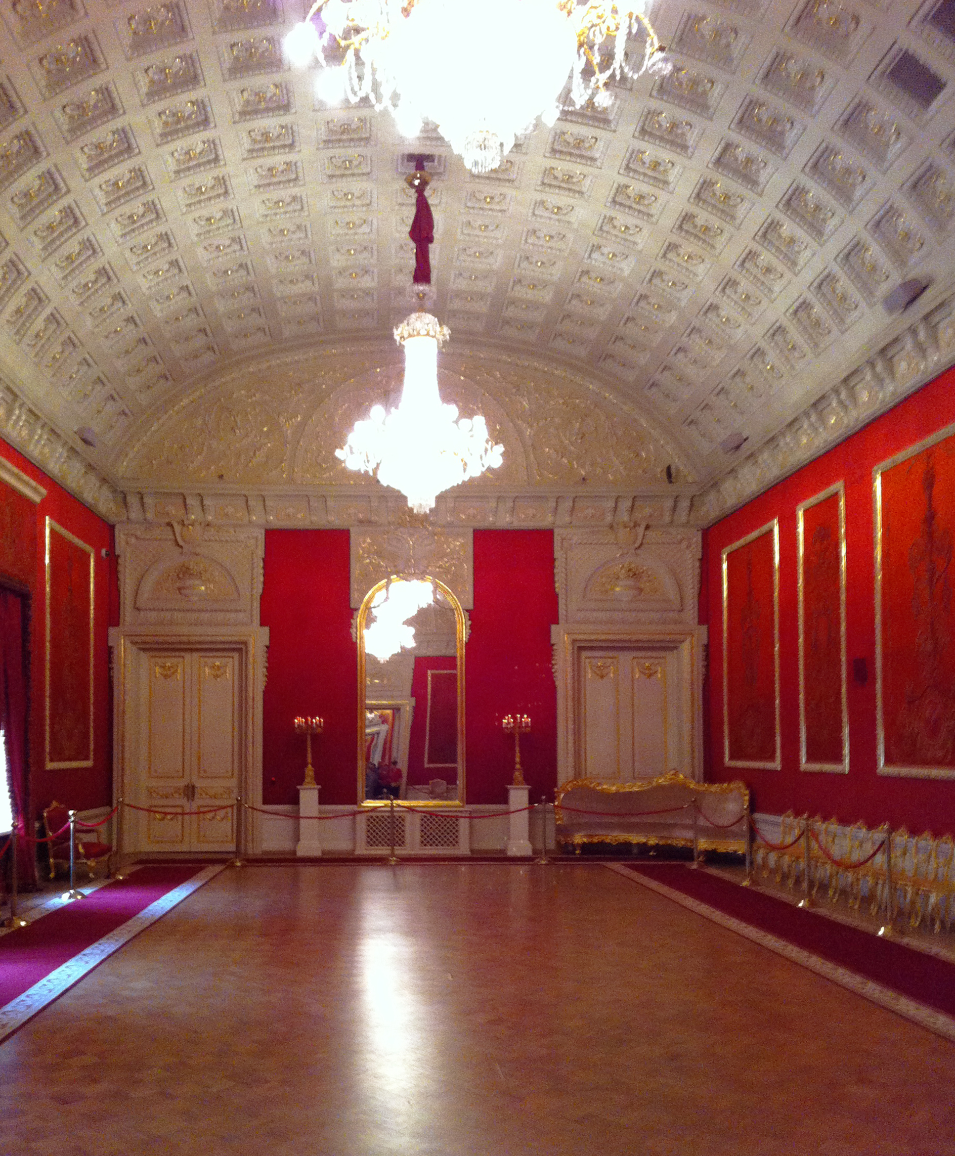 Императорское фойе Большого театра